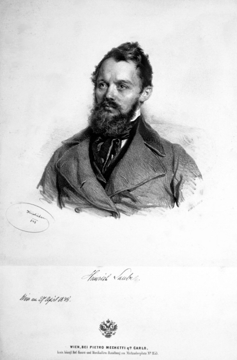 Heinrich Laube, Lithographie von Josef Kriehuber, 1848